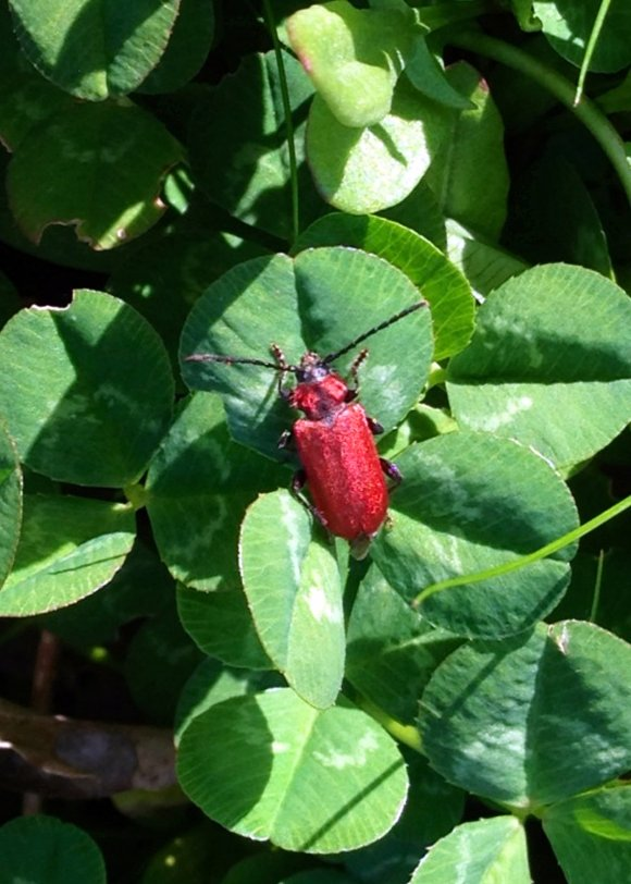 Pyrrhidium sanguineum sur une feuille de pommier